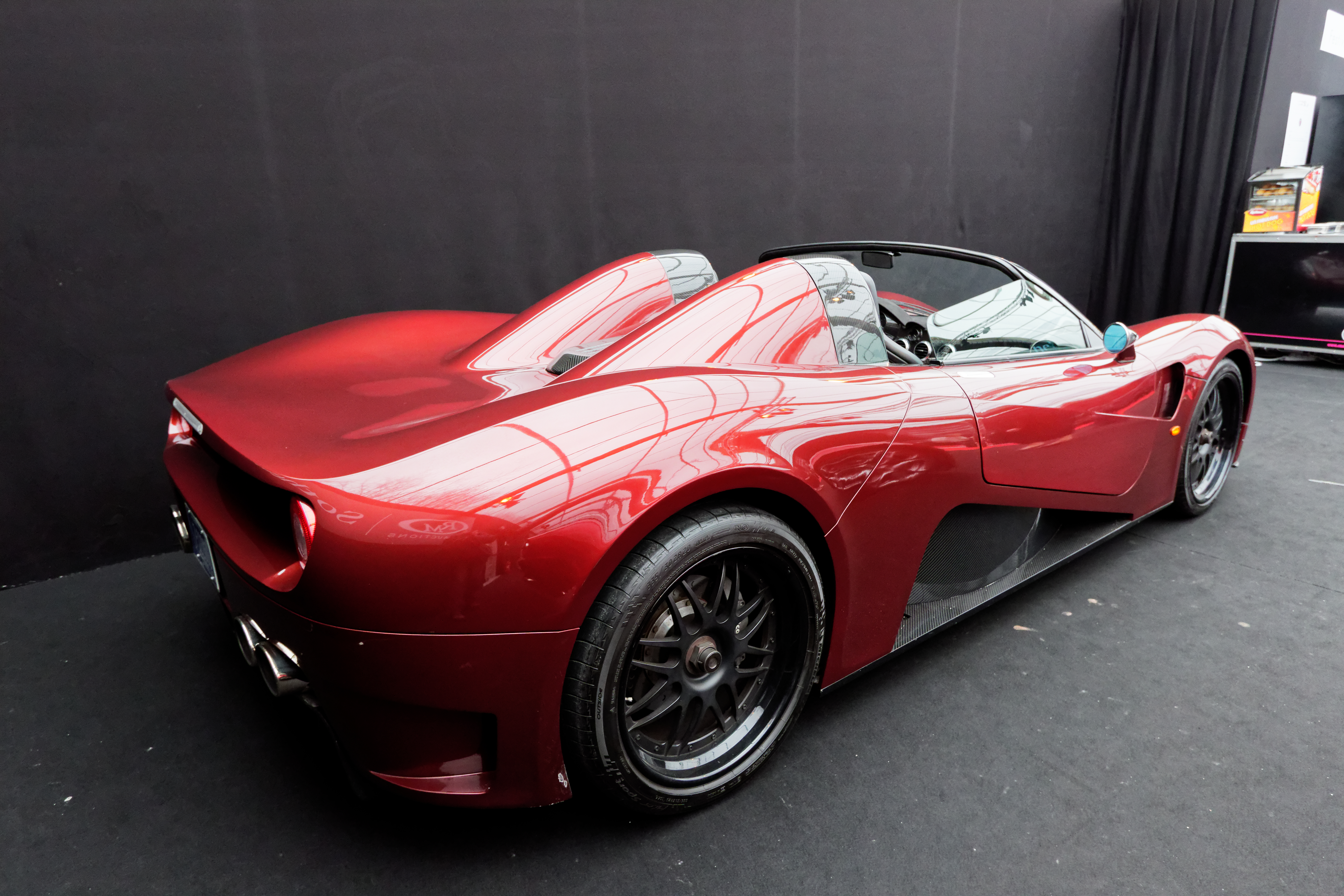 Un véhicule exposé lors de la vente RM Sotheby’s 2018 aux Invalides à Paris.